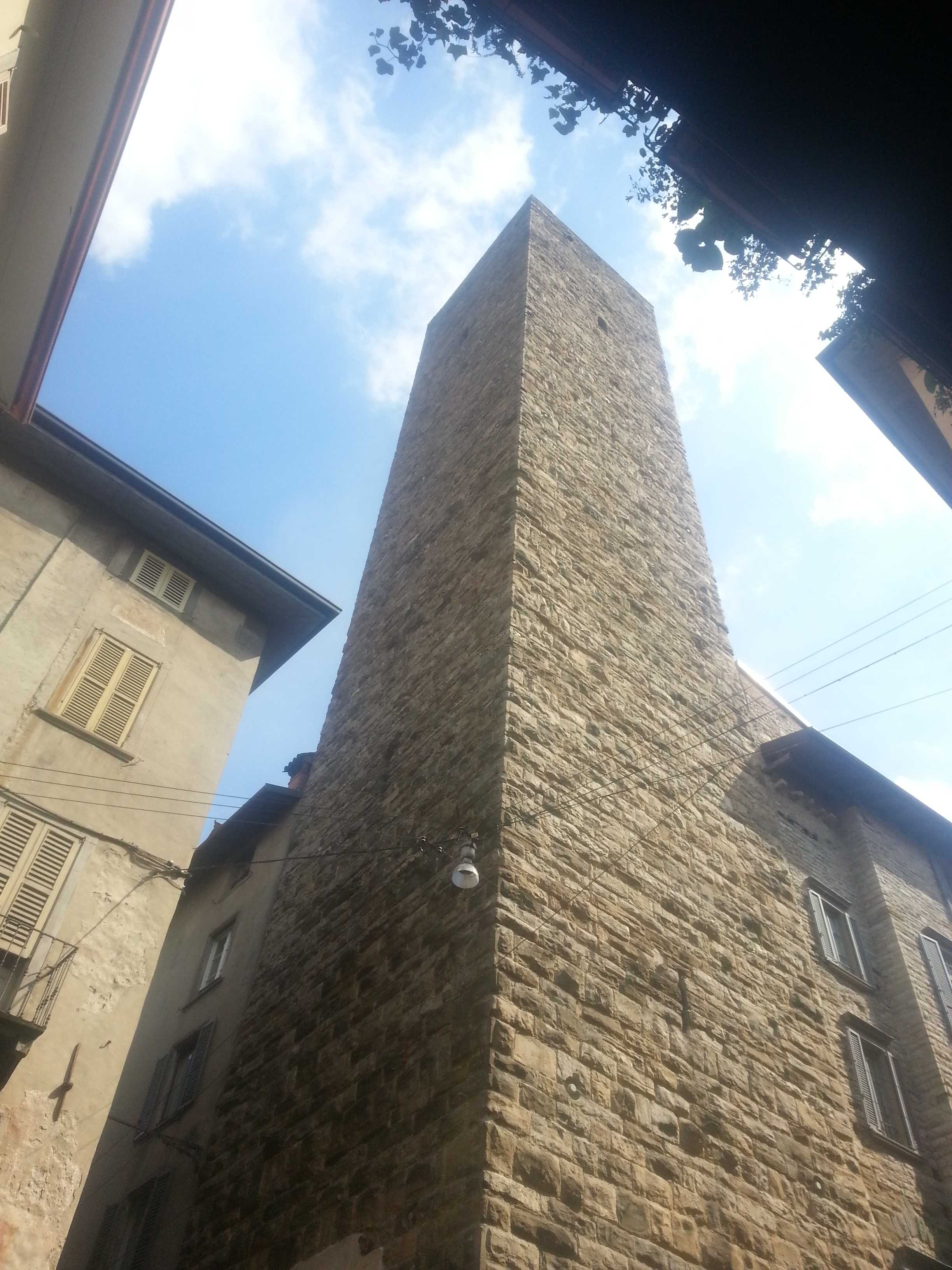 Torre del Gombito - Bergamo - Città alta